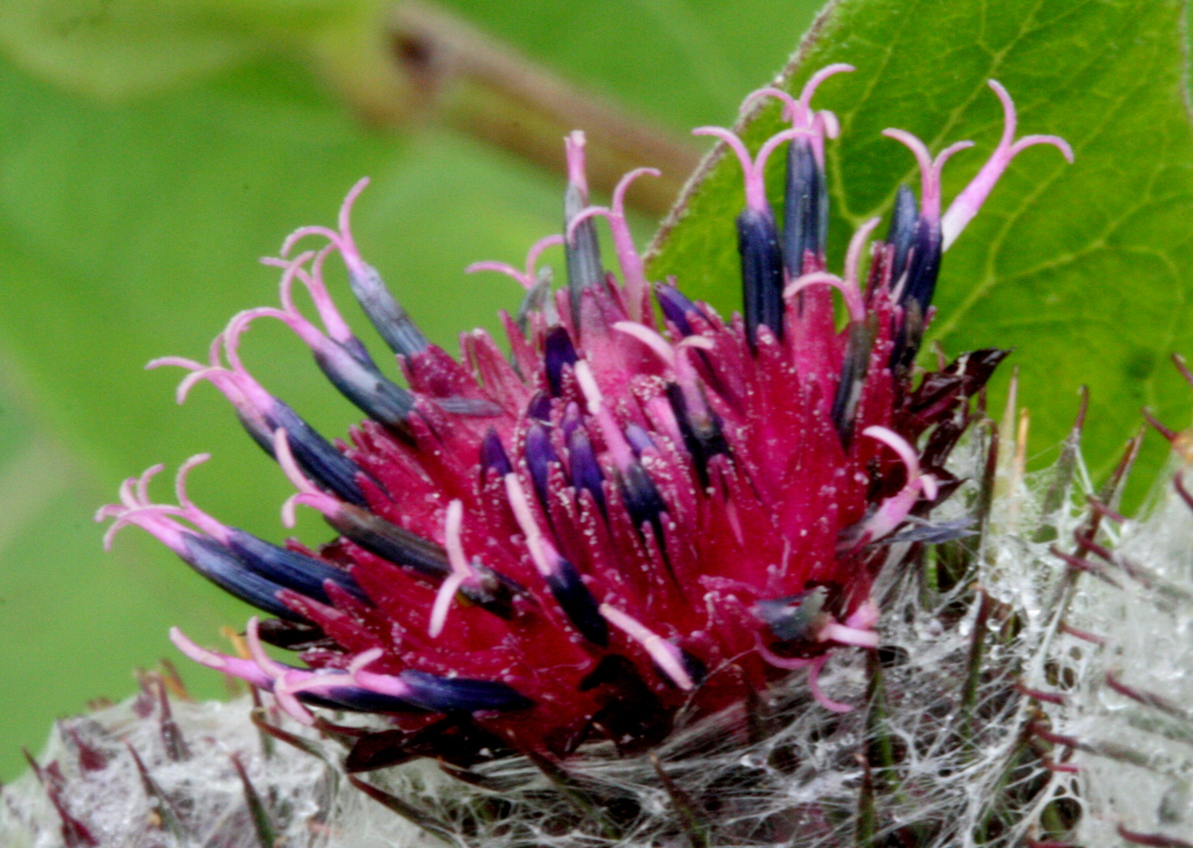 Arctium minus - Località: Cortina (BL), 1400 m s.l.m. - luglio 2008